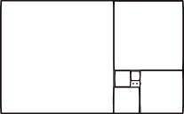 pavage illustrant la fraction continue du nombre d'or. Image personnelle.